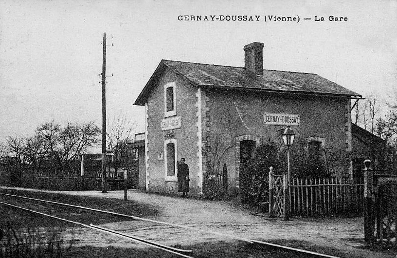 L'arrêt de Cernay-Doussay vers 1900, avec la maison du garde barrière, le passage à niveau et le quai de la halte.